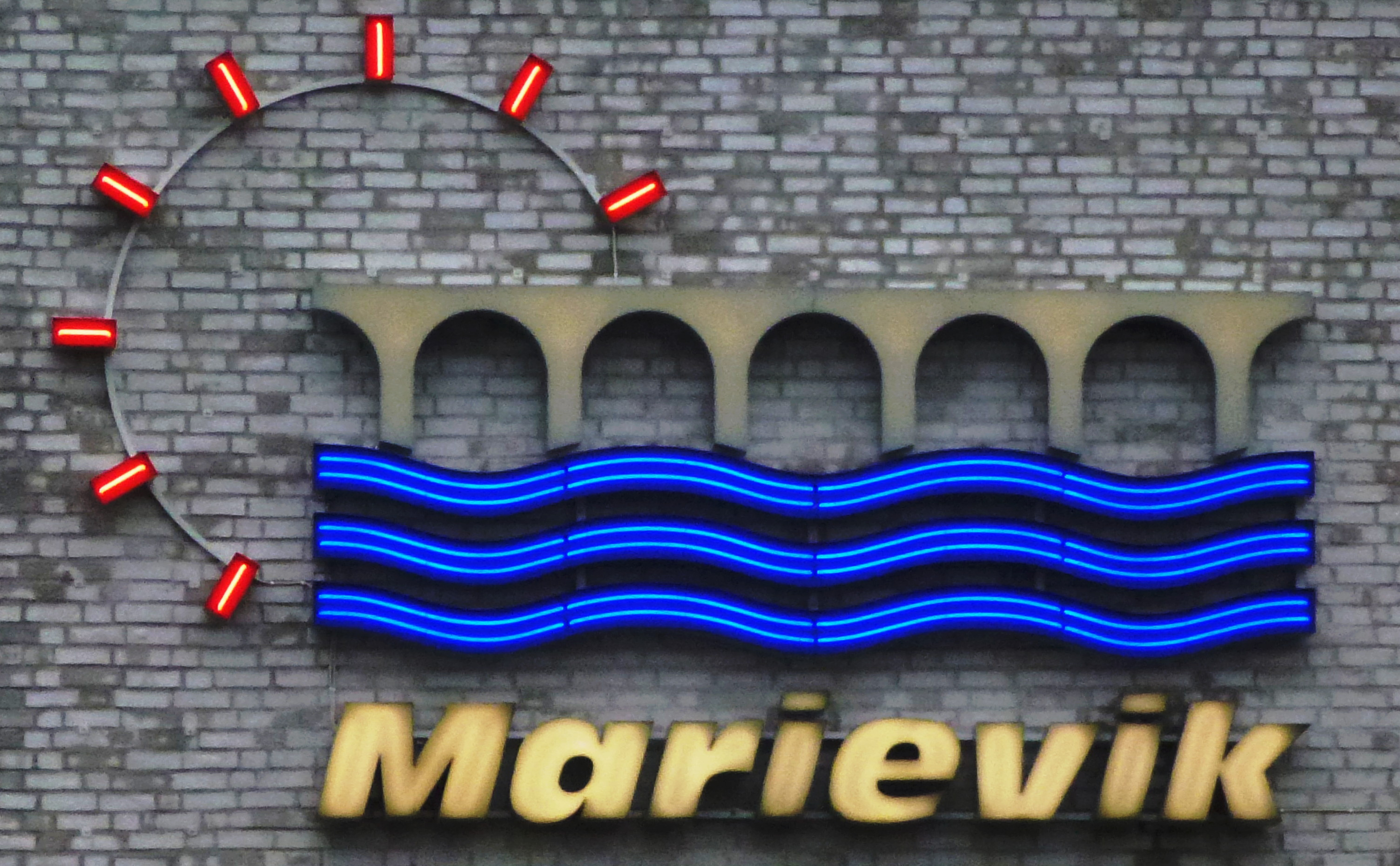 Logo för området "Marievik", Liljeholmen. Symboliserad Årstabro över Årstavikens vågor